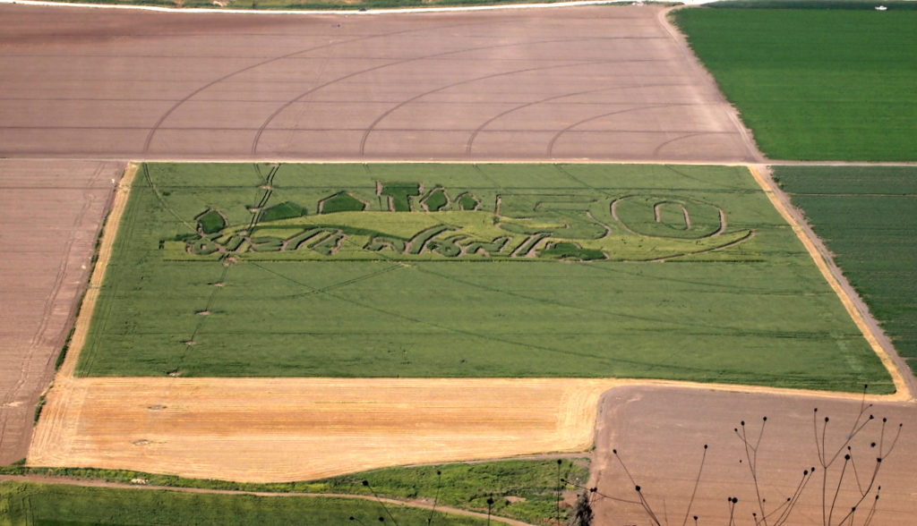 כתובת חרושה לציון 50 שנה למעלה גלבוע